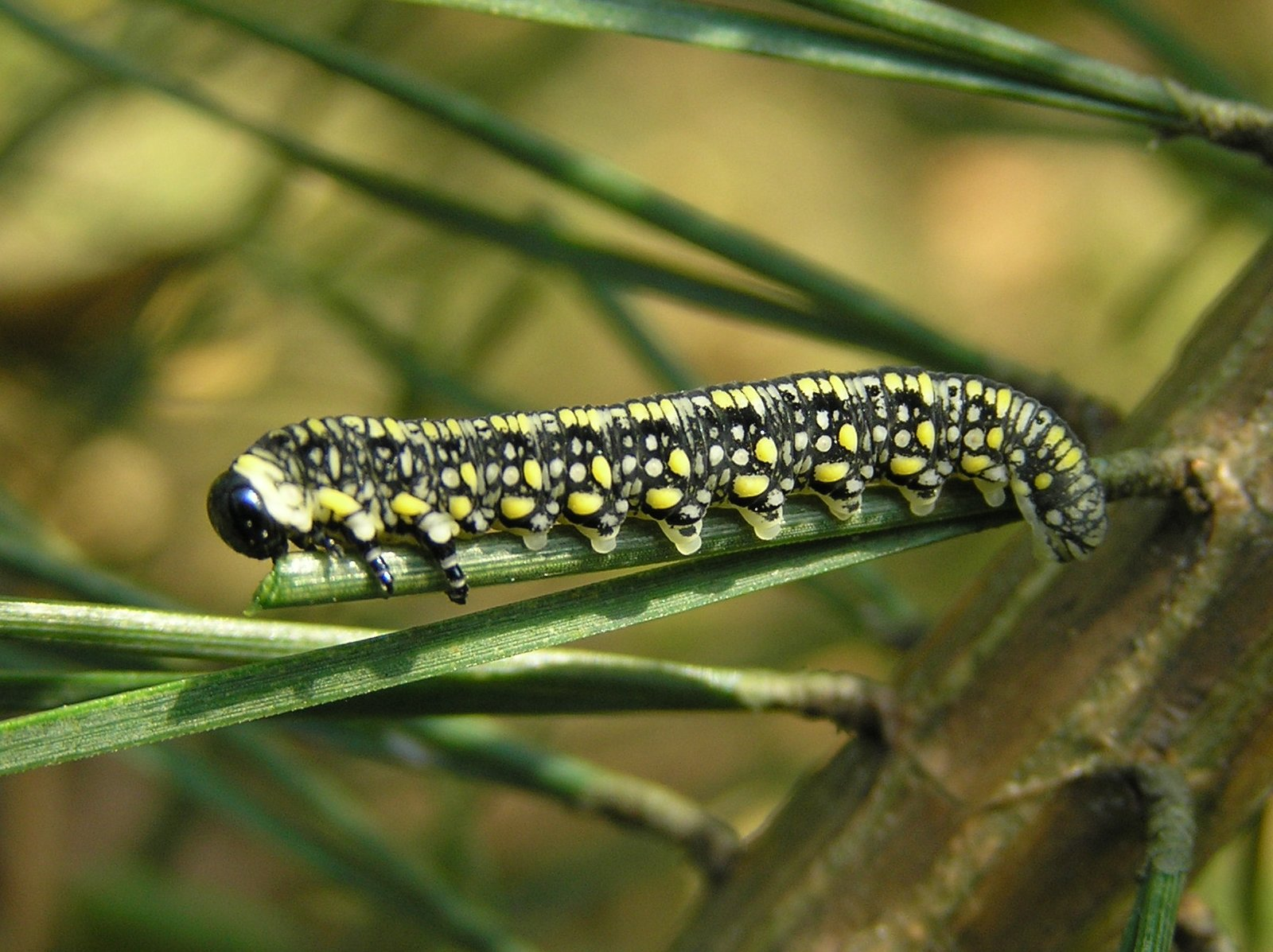 Diprion simile, Borecznik podobny, Polska